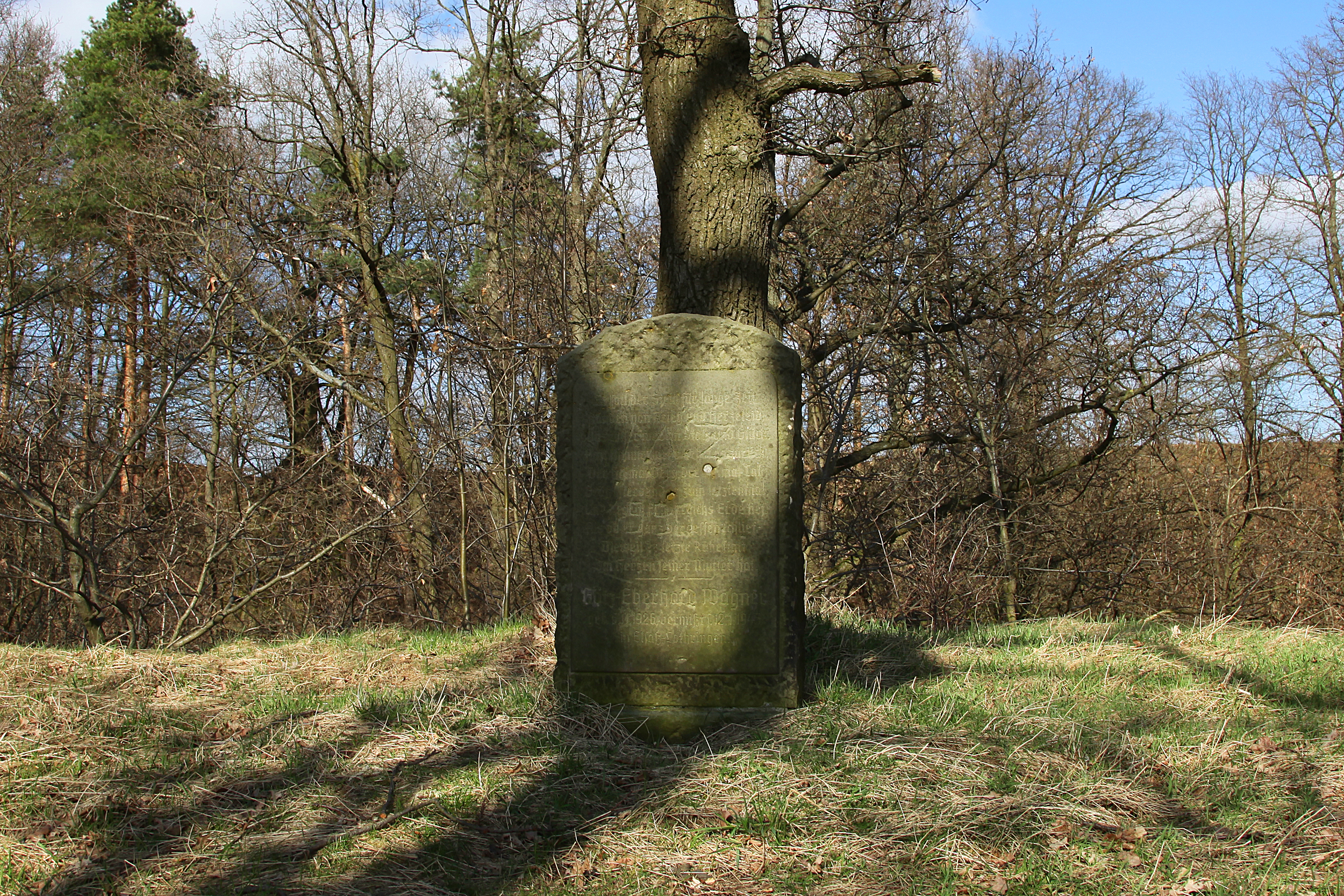 Gedenkstein auf dem Tanneberg, Gemeinde Arnsdorf